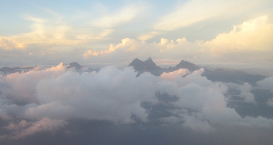 Photo Mont Orohena à Tahiti (Photo personnel 2006) Utilisateur:FRED